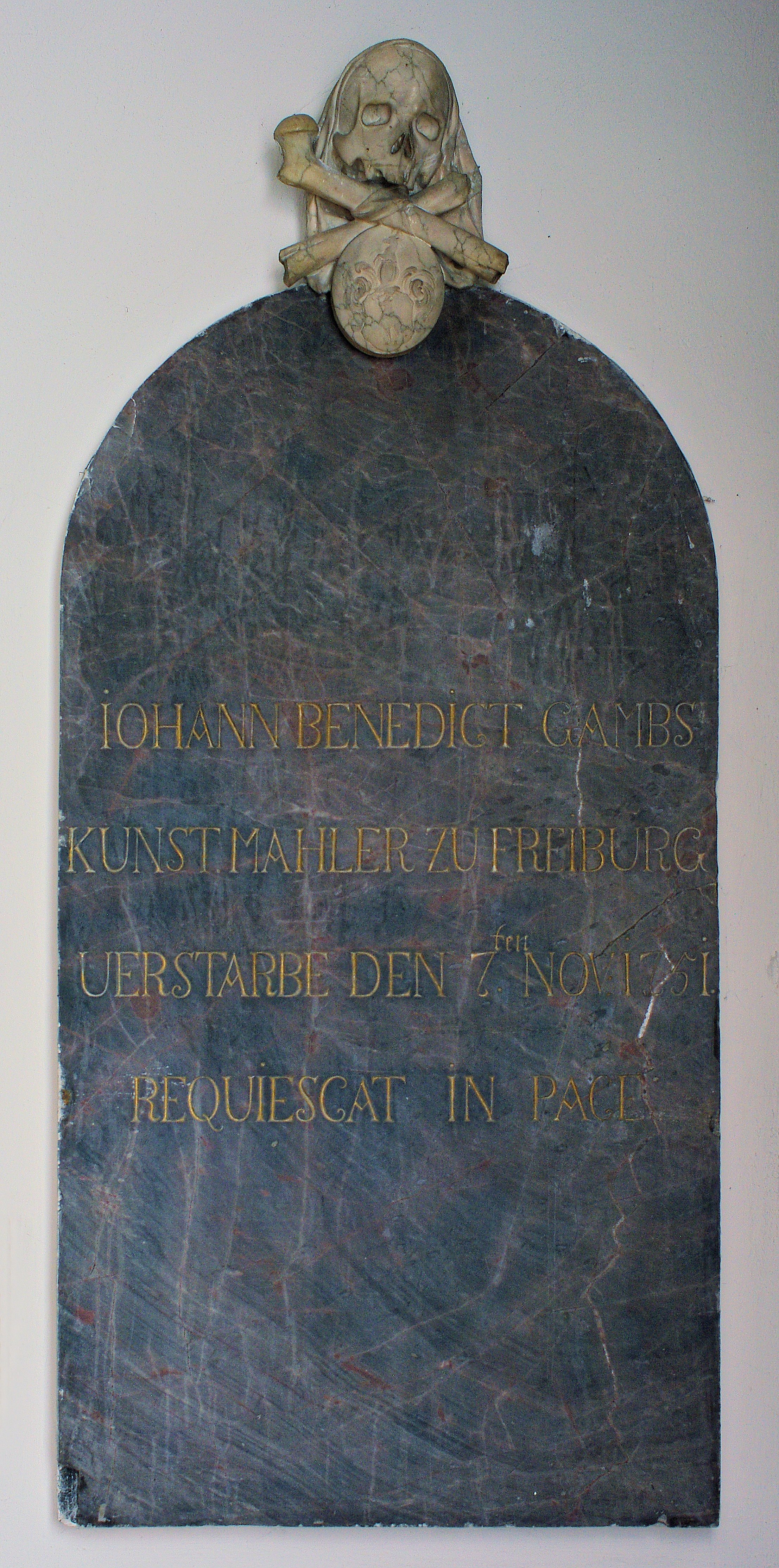 Gedenktafel Bendikt Gambs